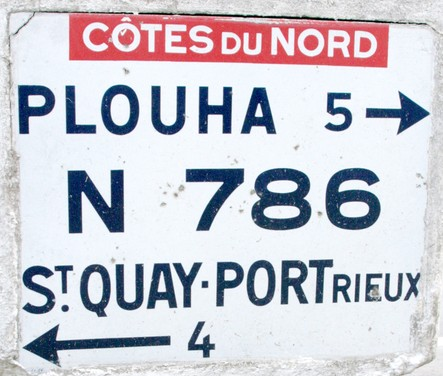 Borne sur l'ancienne N786 en Bretagne